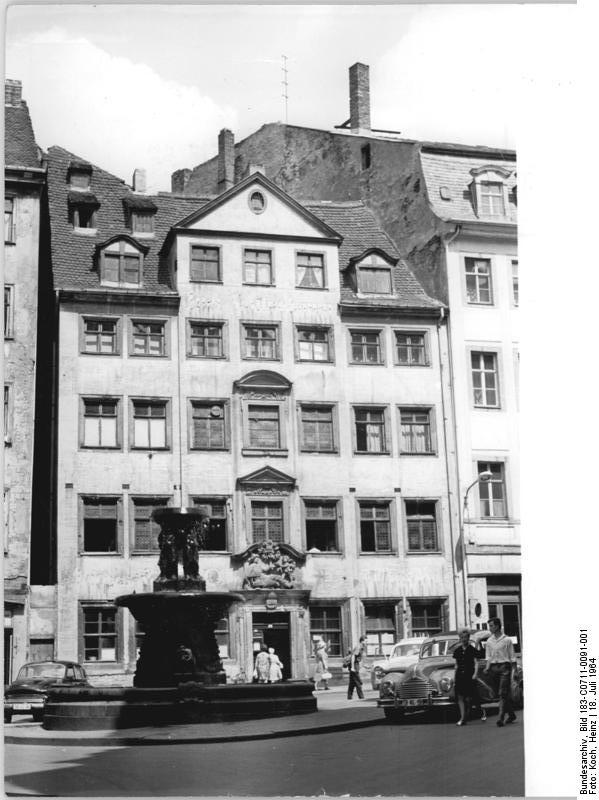 Leipzig, Haus "Zum Kaffeebaum" Zentralbild Koch 18.7.1964 1965-800 Jahrfeier der Messestadt-Aufbau des Leipziger Stadtzentrums Eines der ältesten Bauten in Leipzig ist das Haus "Zum Kaffeebaum". Um 1500 erbaut beherbergt die älteste Kaffeestube der Messestadt.